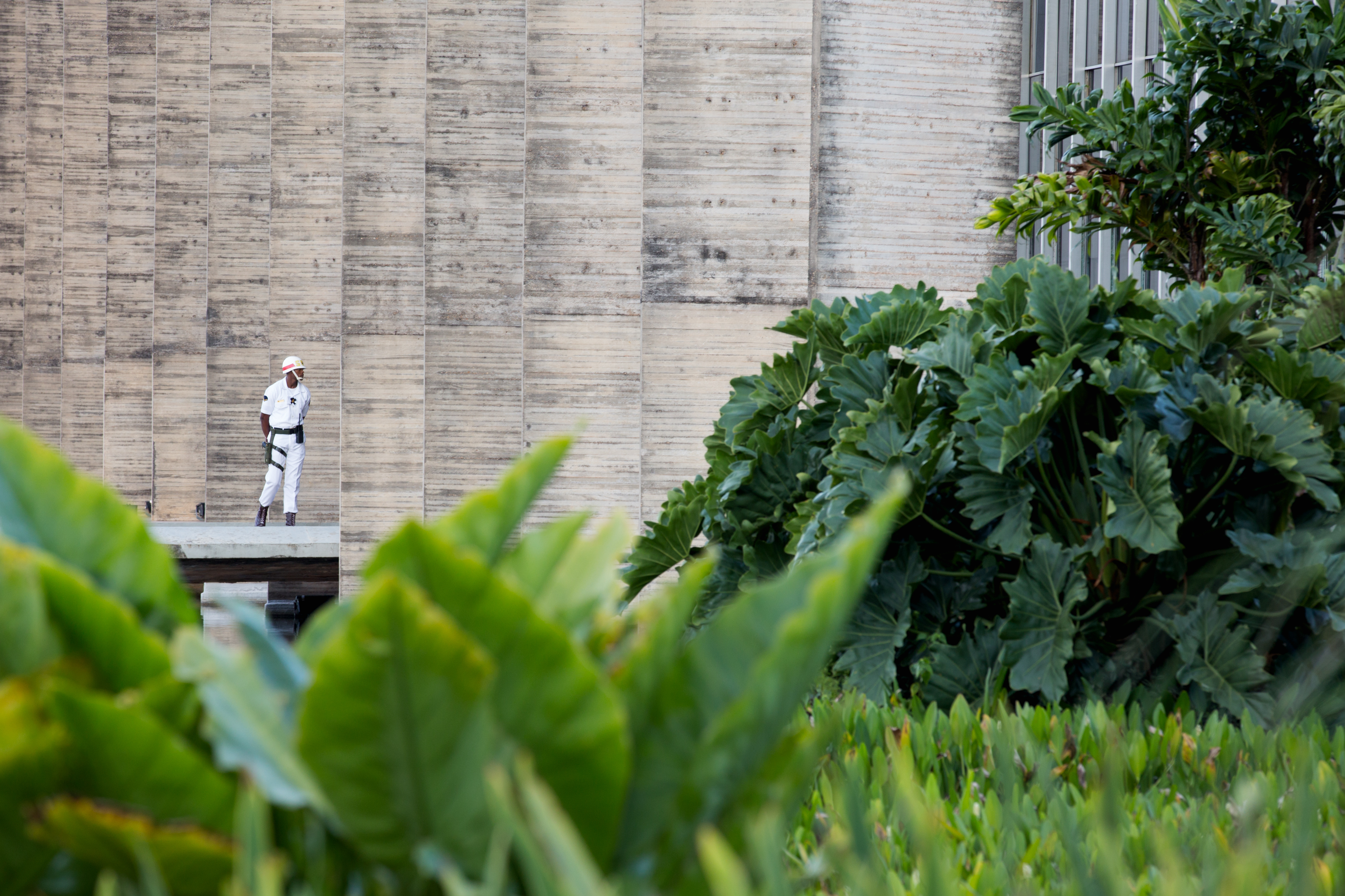 Palácio do Itamaraty. Foto: Janine Moraes/MinC O Ministério da Cultura, por meio do Instituto do Patrimônio Histórico e Artístico Nacional (Iphan), homologou o tombamento de um conjunto de 27 obras do arquiteto Oscar Niemeyer, localizadas em Brasília, Rio de Janeiro e São Paulo. As obras passam agora a ser protegidas pelo Iphan como Patrimônio Cultural Brasileiro. São elas: o Museu da Cidade, o Espaço Lúcio Costa, o Panteão da Liberdade e Democracia, o Teatro Nacional, o Memorial JK, o Memorial dos Povos Indígenas, o Conjunto Cultural Funarte, o Espaço Oscar Niemeyer, o Conjunto Cultural da República, o Edifício do Touring Club do Brasil, a Praça dos Três Poderes, a Casa de Chá, Pombal, o Palácio da Justiça, o Palácio Itamaraty e anexos, a Capela Nossa Senhora de Fátima, o Conjunto do Palácio da Alvorada, o Congresso Nacional, o Palácio do Planalto, o Supremo Tribunal Federal, os prédios dos Ministérios e anexos, o Quartel General do Exército, o Palácio Jaburu, todos esses localizados em Brasília (DF). Além dos bens listados na capital federal, estão protegidos também a Casa das Canoas (RJ), o Conjunto da Passarela do Samba (RJ), o Museu de Arte Contemporânea (RJ), o Conjunto do Parque do Ibirapuera – especificamente, a Grande Marquise, o Palácio das Nações (Pavilhão Manoel da Nóbrega), o Palácio dos Estados (Pavilhão Francisco Matarazzo Sobrinho), o Palácio das Indústrias (Pavilhão Armando de Arruda Pereira), o Palácio de Exposições ou das Artes (Pavilhão Lucas Nogueira Garcez, conhecido como "Oca") e o Palácio da Agricultura (SP).